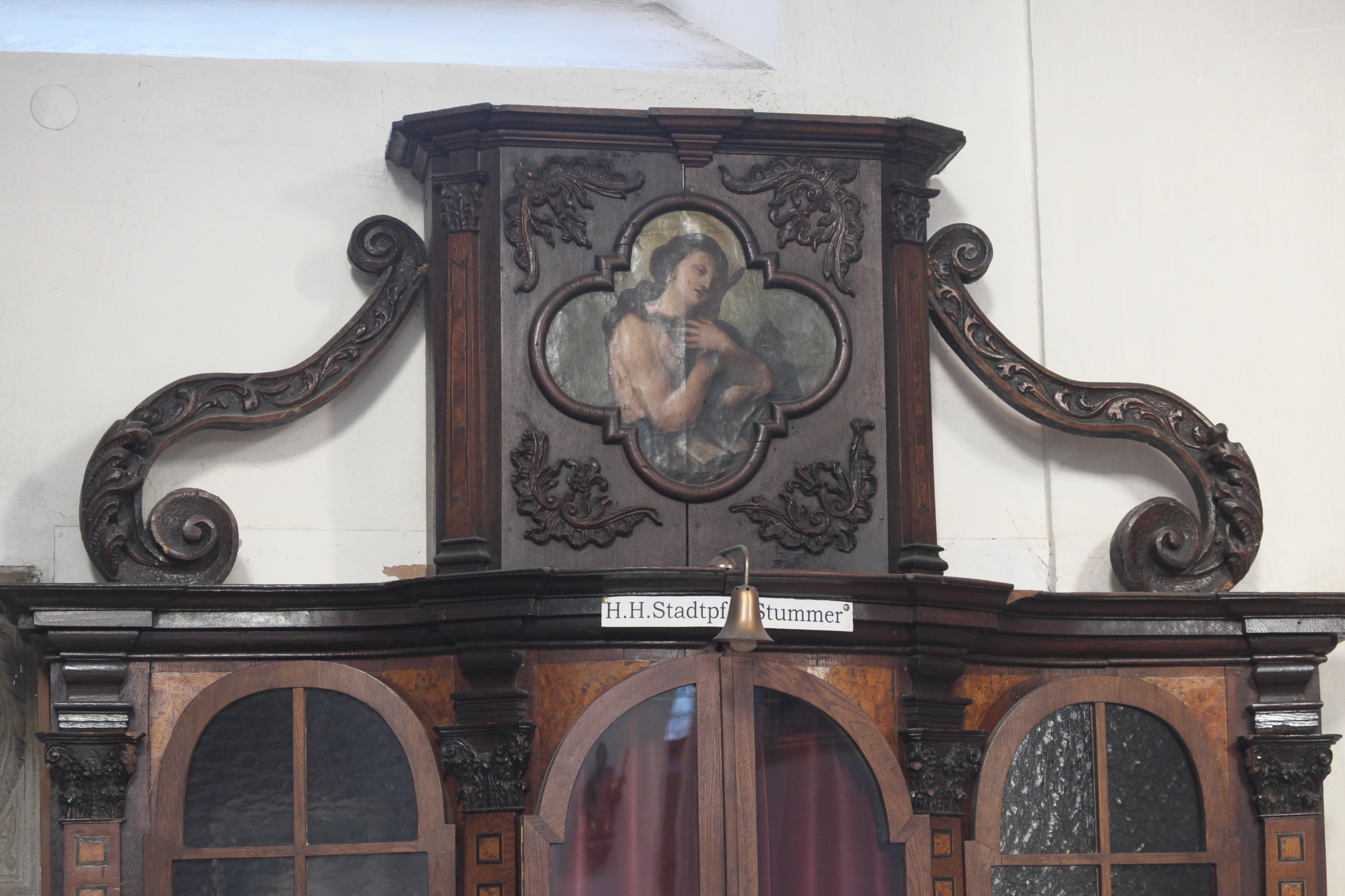 Katholische Pfarrkirche St. Emmeram, ehemalige Benediktinerinnen-Klosterkirche Mariä Himmelfahrt, in Geisenfeld im Landkreis Pfaffenhofen an der Ilm (Bayern/Deutschland), Aufsatz eines Beichtstuhls